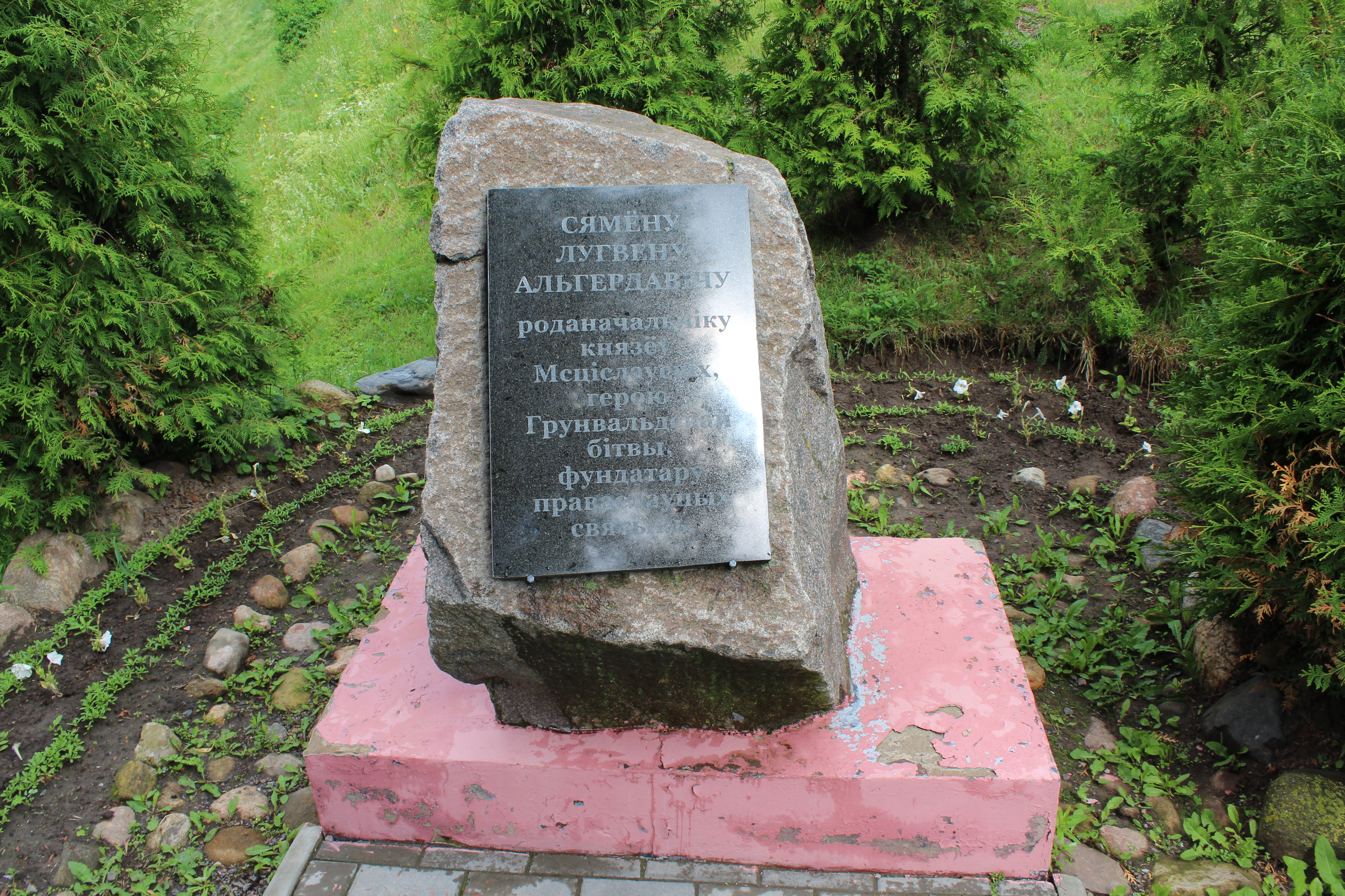 Мсціслаў. Краявіды